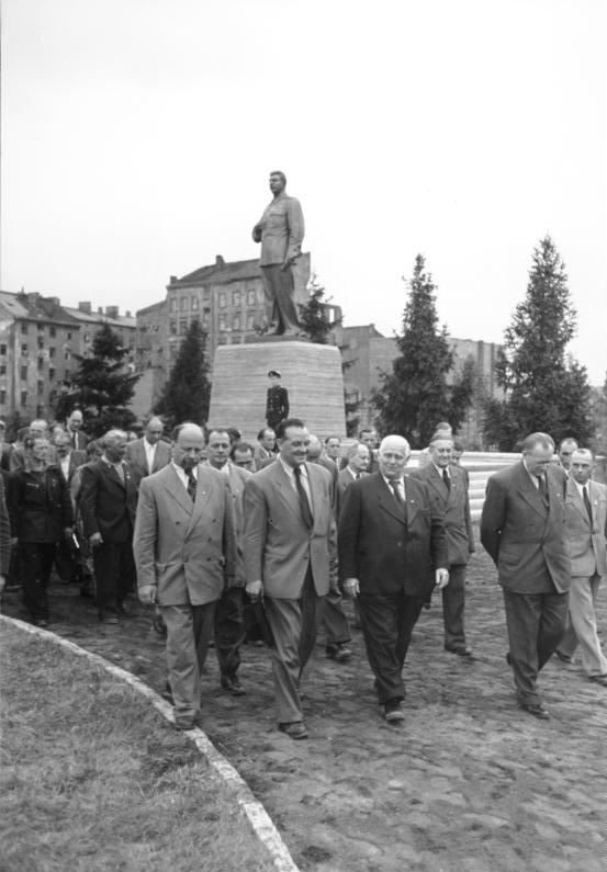 Berlin, Stalindenkmal, Enthüllung Illus/Heilig 3.8.1951 Stalin-Denkmal enthüllt Am 3.8.1951 wurde in der Stalinallee gegenüber der Deutschen Sporthalle ein Stalin-Denkmal im Beisein des Präsidenten Wilhelm Pieck, Ministerpräsidenten Otto Grotewohl [vorn rechts] und des Stellvertretenden Ministerpräsidenten Walter Ulbricht [vorn links] enthüllt. UBz: Nach der Denkmalsenthüllung Bild Mitte: Präsident Pieck Abgebildete Personen: Grotewohl, Otto: Ministerpräsident, stellvertretender Staatsratsvorsitzender, DDR Ulbricht, Walter: Staatsratsvorsitzender, Erster Sekretär des Zentralkomitees (ZK) der SED, Vorsitzender des Nationalen Verteidigungsrates, DDR Pieck, Wilhelm: Präsident, Politbüro der SED, Vorsitzender der KPD, DDR